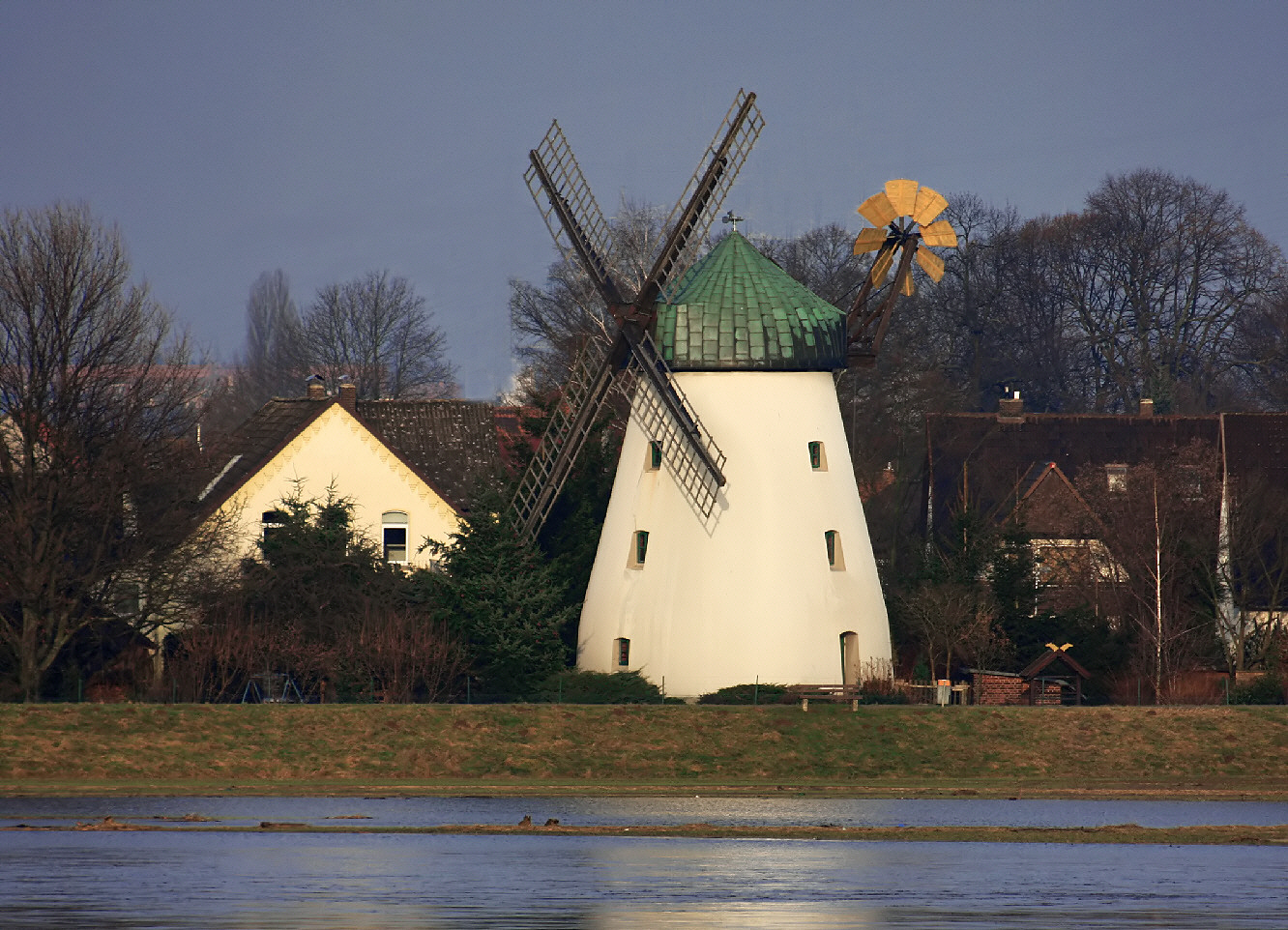 Tünderns Windmühle an der Weser